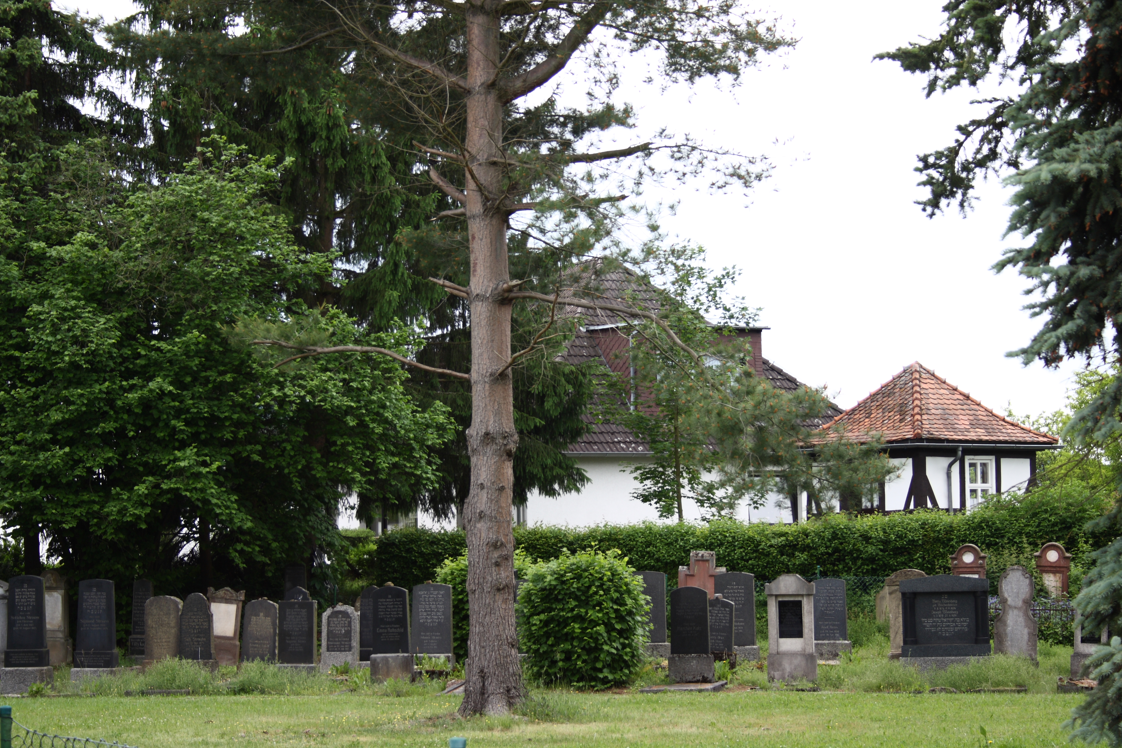 Jüdischer Friedhof, Am Kalkofen, in Lauterbach im Vogelsbergkreis (Hessen)